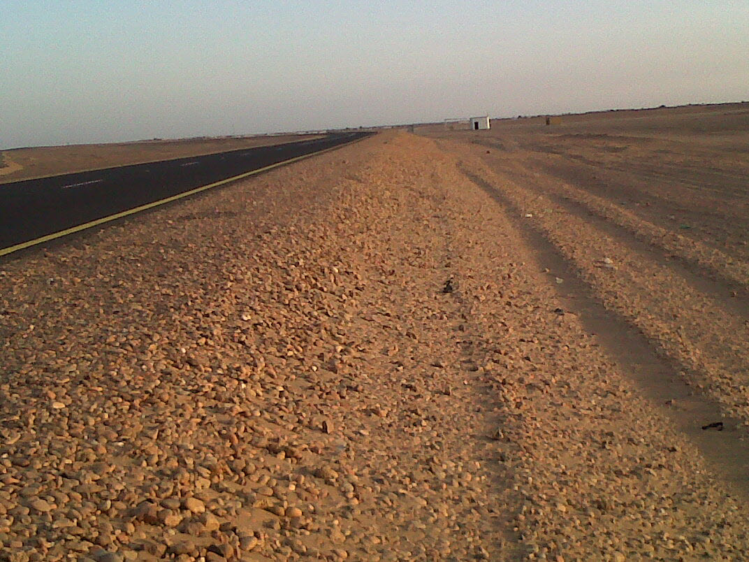 شريان الشمال 13-3-013